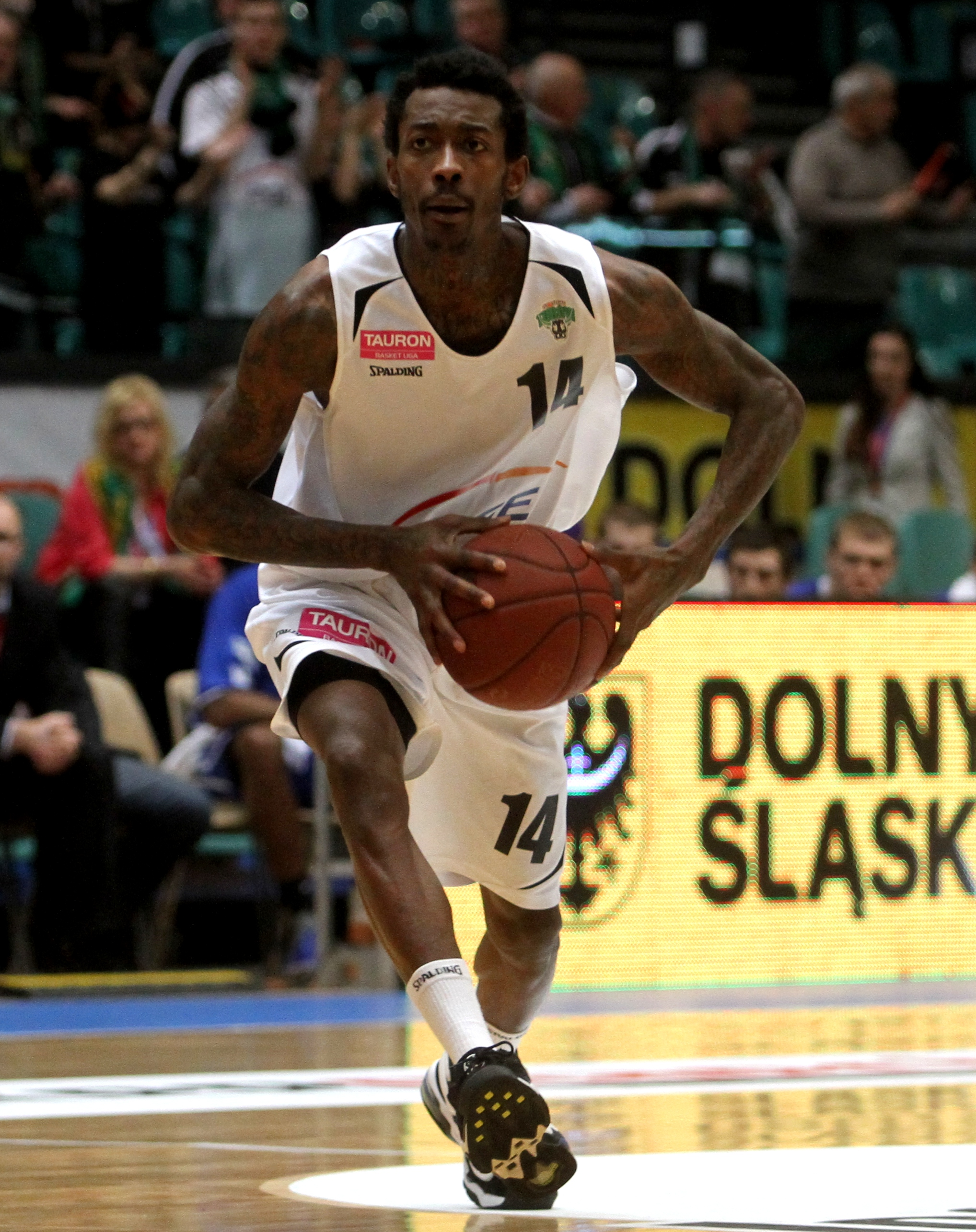 Mike Taylor, PGE Turów Zgorzelec